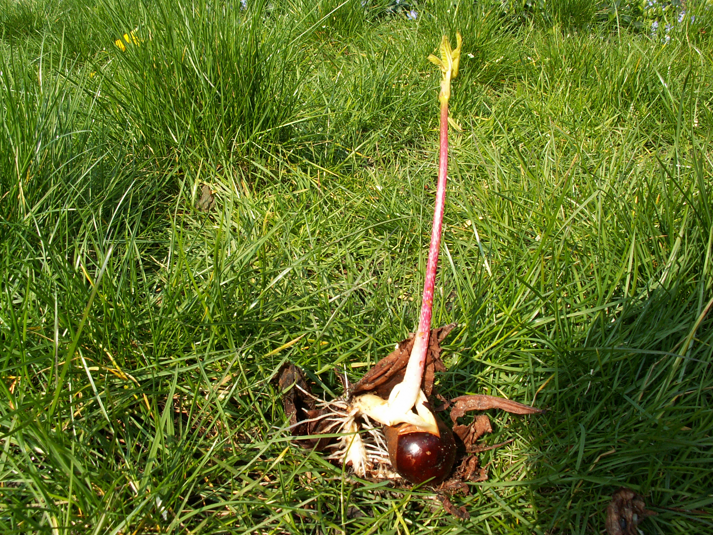 Aesculus hippocastanum seedling